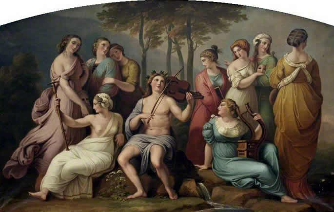 (after Raphael)